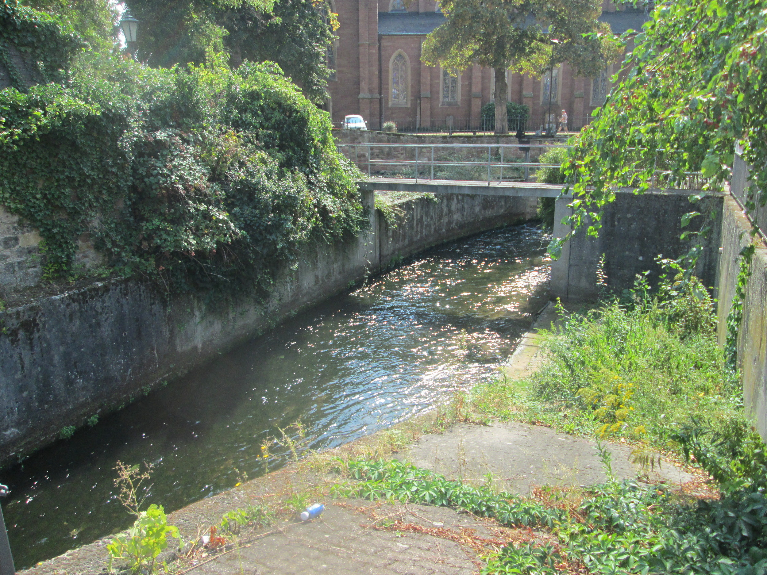 Floßbach, ein linker Teilungsarm des Speyerbachs in Neustadt an der Weinstraße